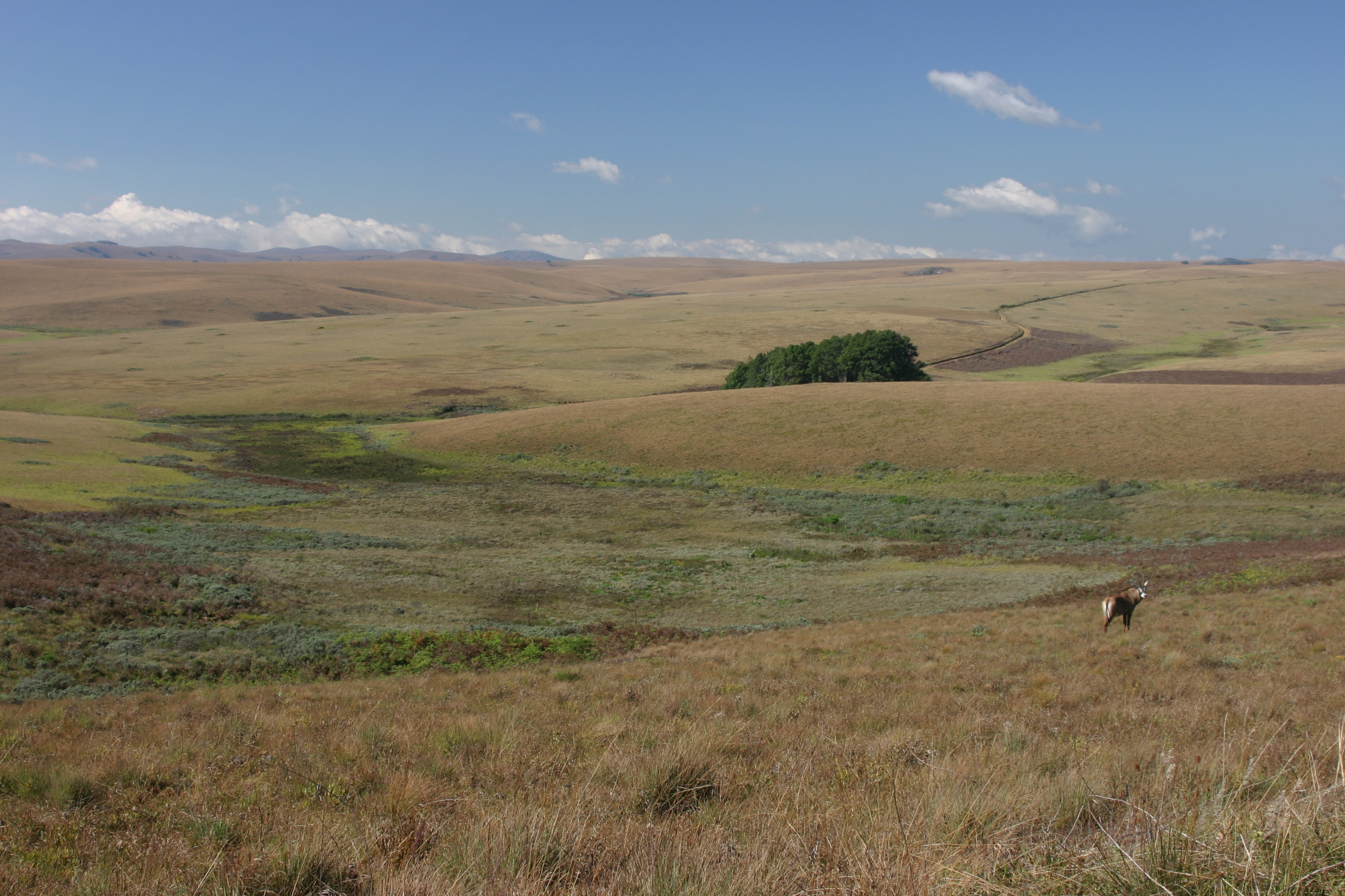 Typical Dambo, Nyika Plateau, Malawi